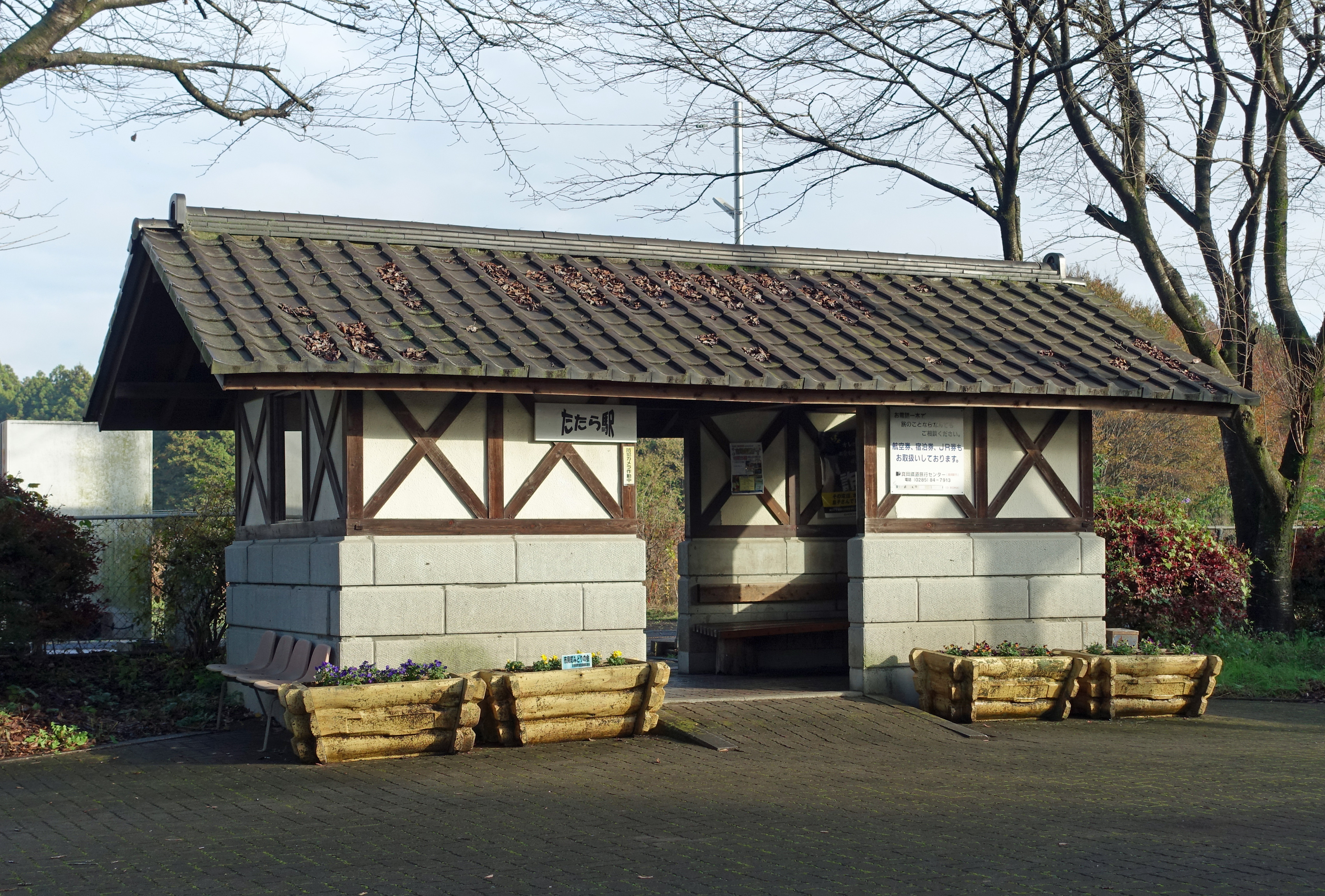 真岡鐵道多田羅駅・駅舎